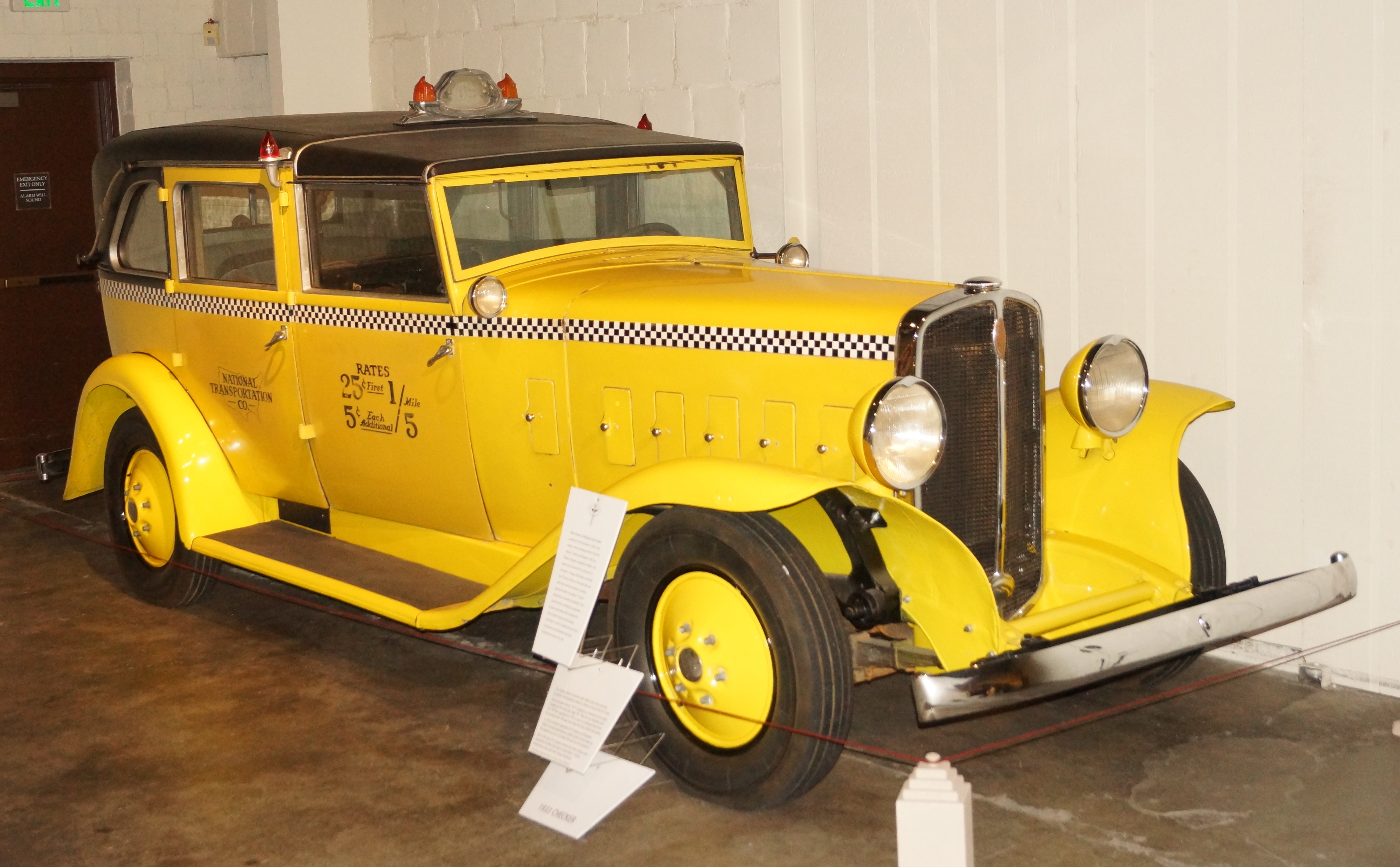 1933 Checker Model TAuburn Cord Duesenburg (ACD) Automobile Museum